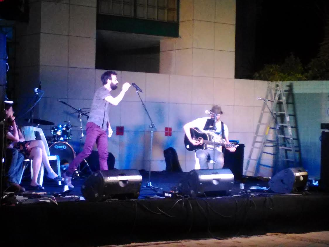 מופע פואטרי סלאם במסגרת פסטיבל ביאליק לשירה וספרות, בקרית ביאליק